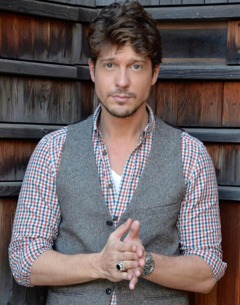 Sebastian Deyle, Moderator und Schauspieler